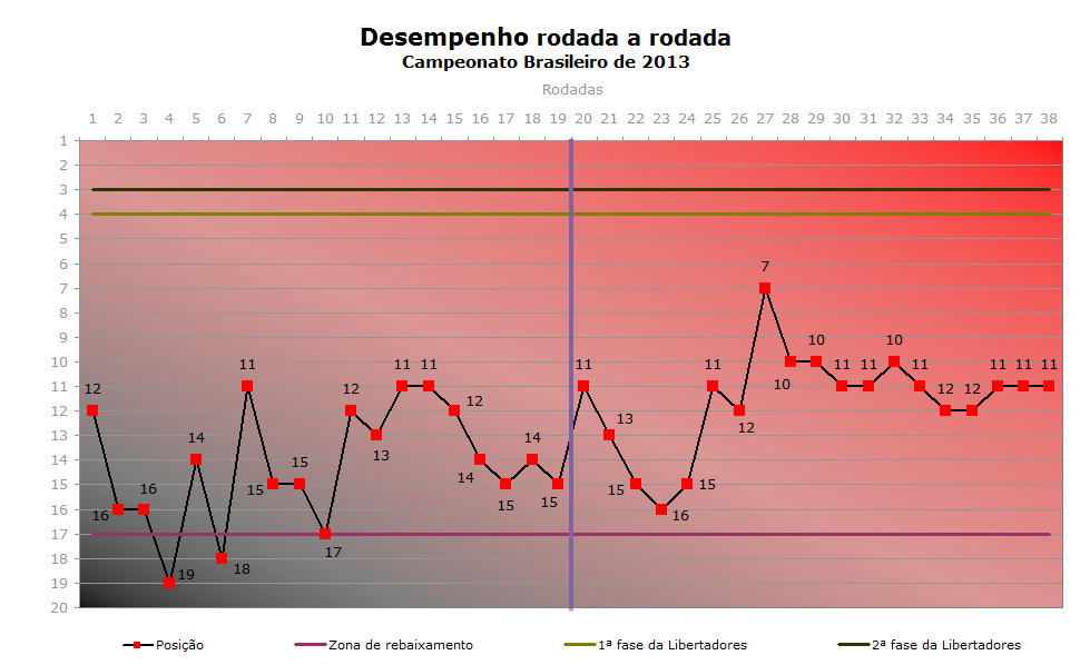 Desempenho, rodada a rodada, do Clube de Regatas do Flamengo no Campeonato Brasileiro de Futebol de 2013.